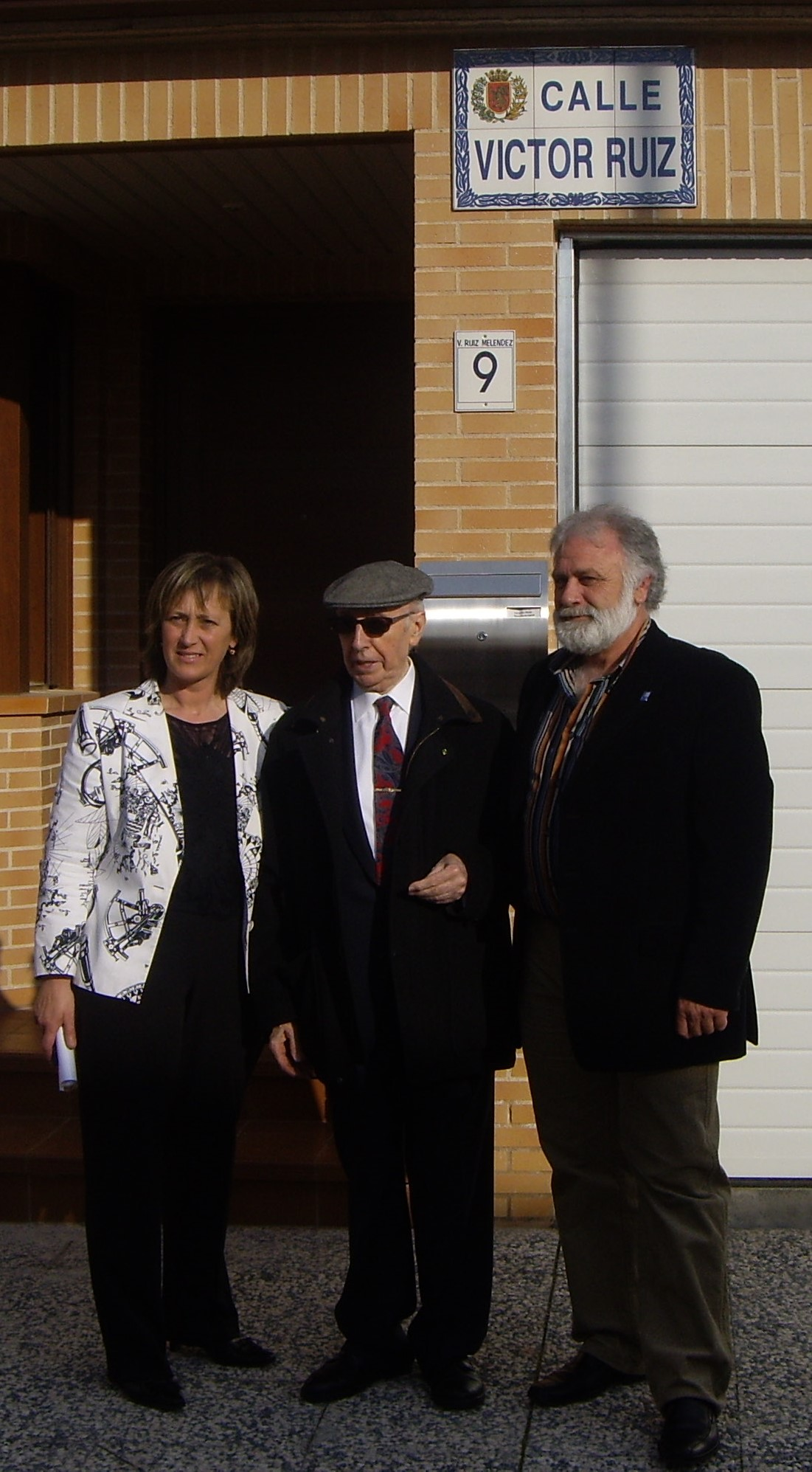 Foto inauguración calle